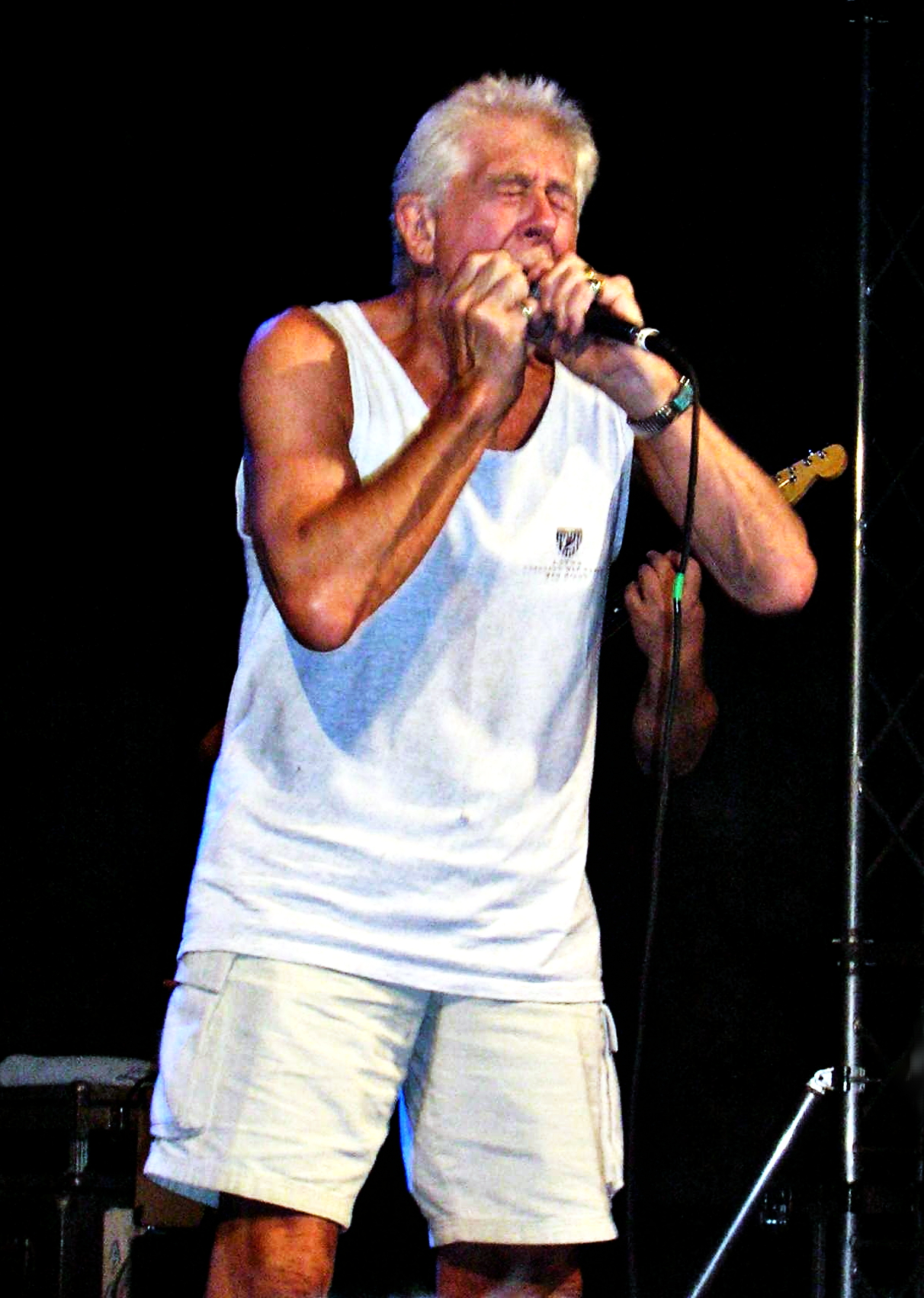 John Mayall Pilisszántón